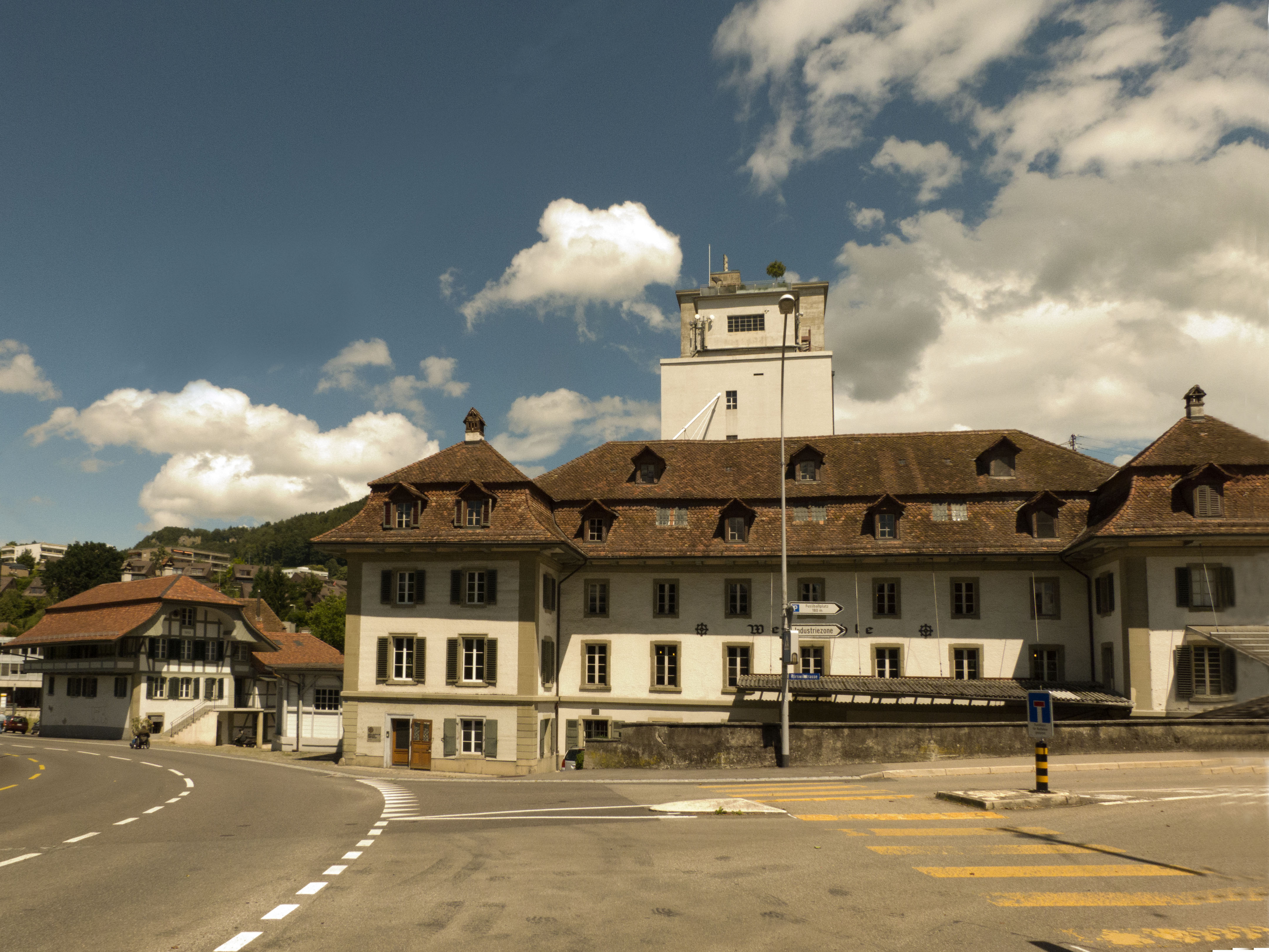 Wegmühle Bolligen Westfassade und Stöckli